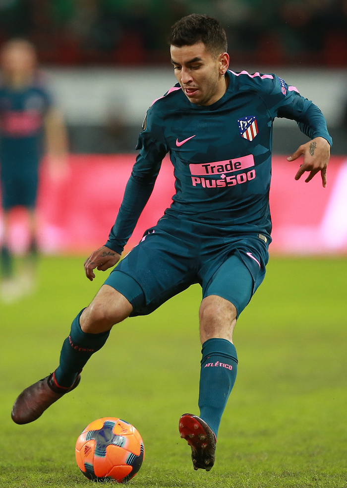 Вечер, когда «Локомотив» встретился с грандом